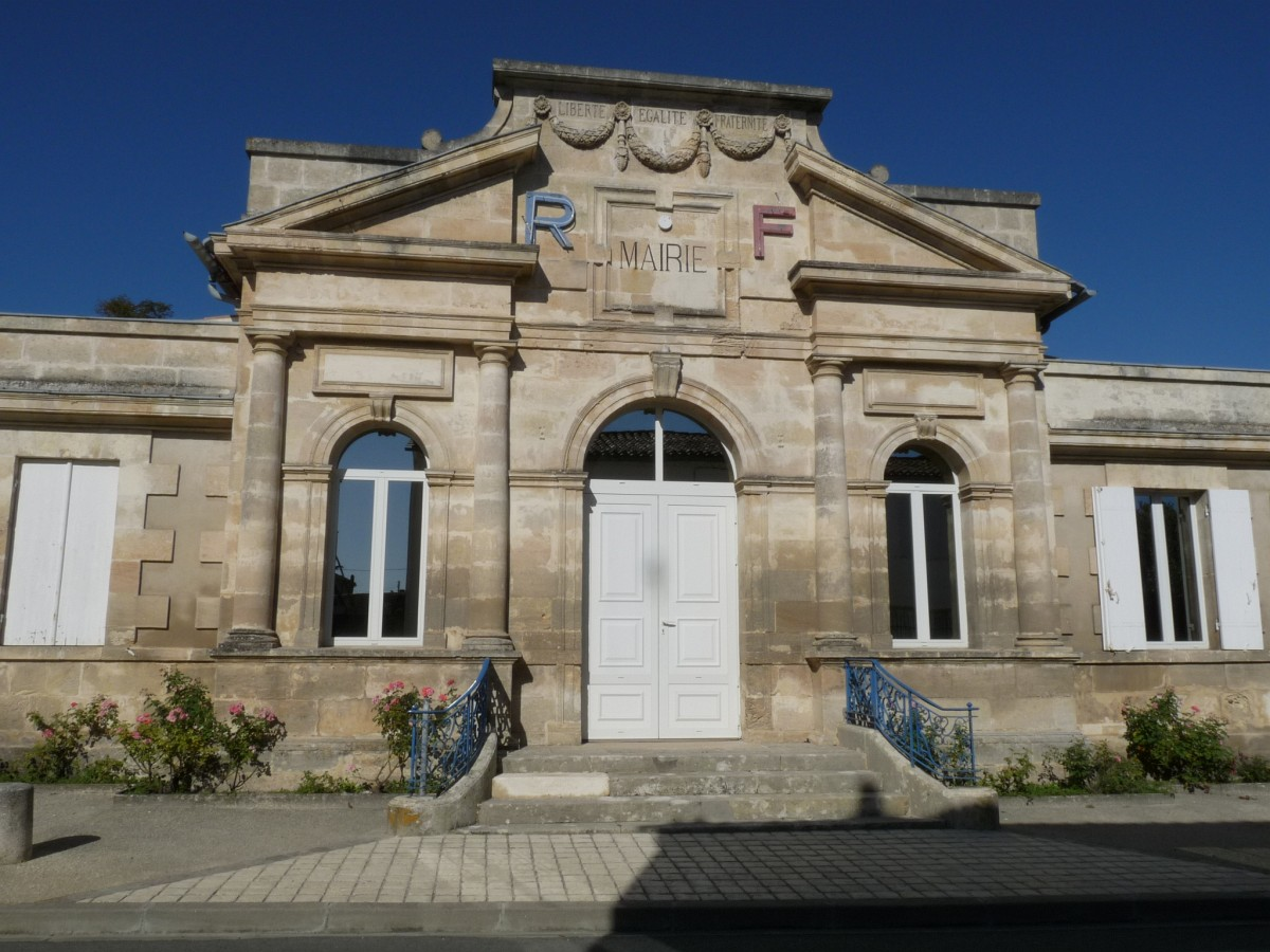 Mairie de Bégadan (ancienne entrée), Gironde, France